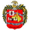 Escudo de la ciudad de Loja, Ecuador